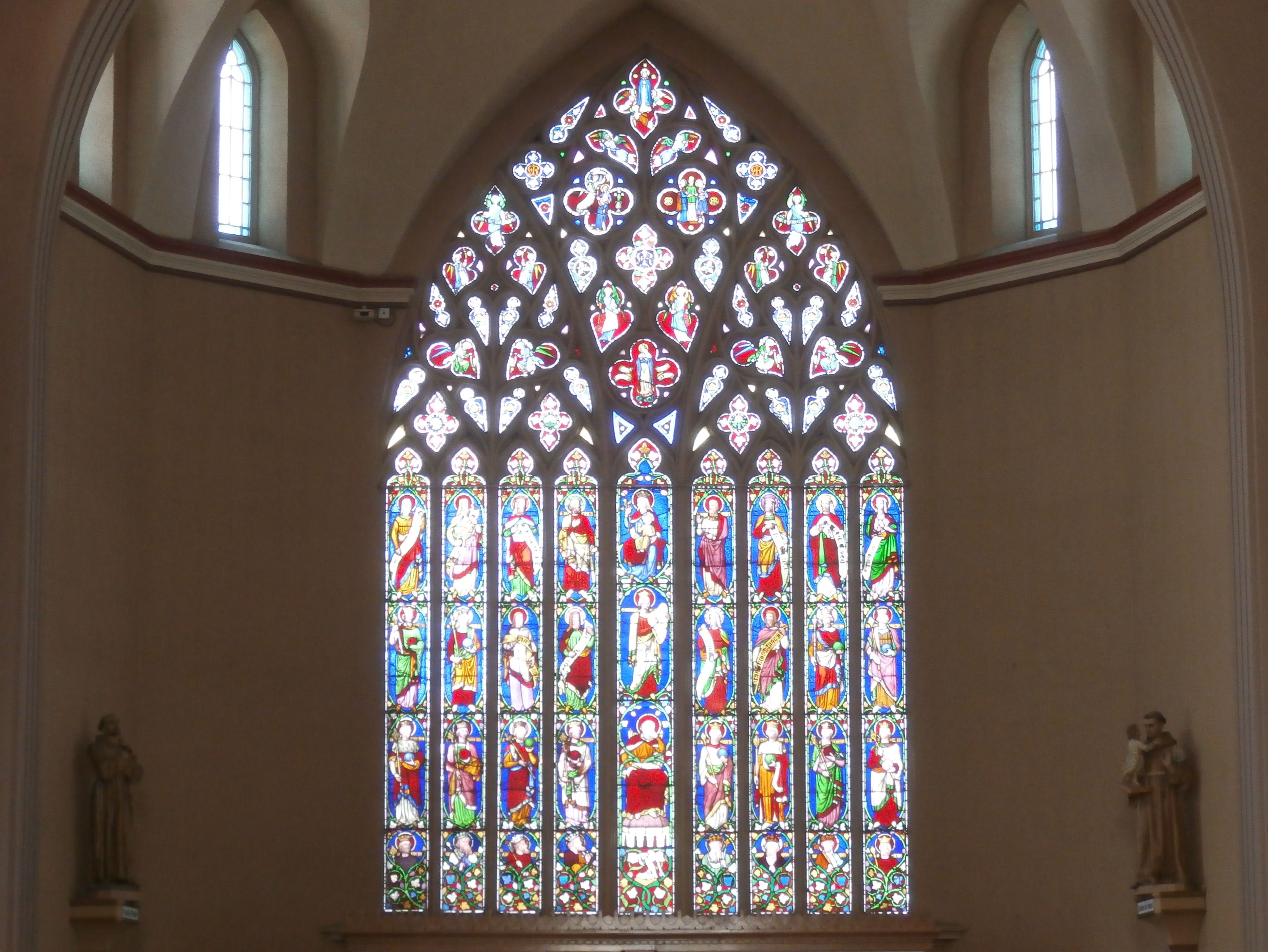 Verrière L'arbre de Jessé et scènes de la vie de la Vierge Marie (1849) du verrier britannique William Wailes.